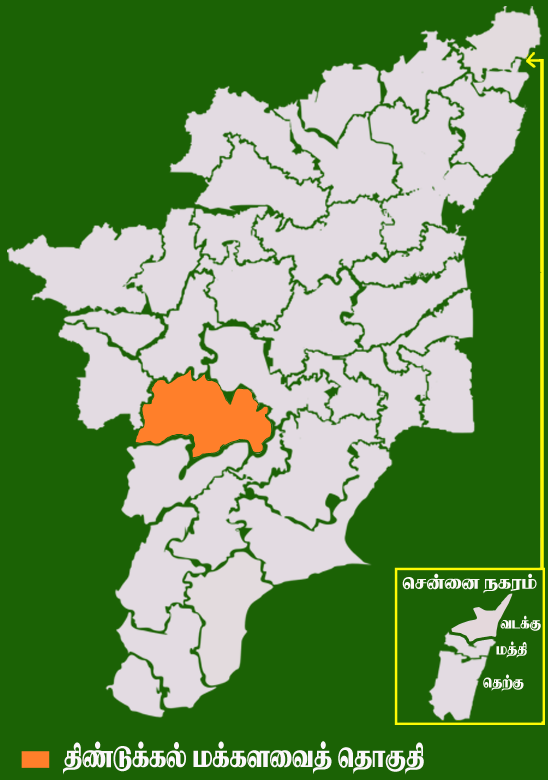 தமிழக வரைபடத்தில் உள்ள திண்டுக்கல் மக்களவைத் தொகுதி